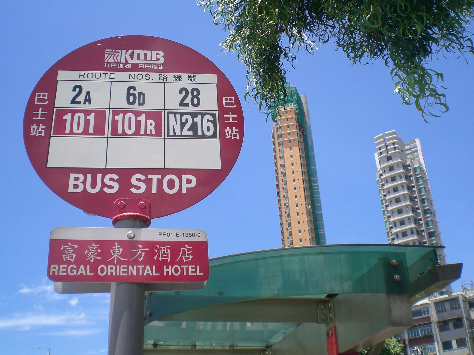 香港九龍城富豪東方酒店巴士站。